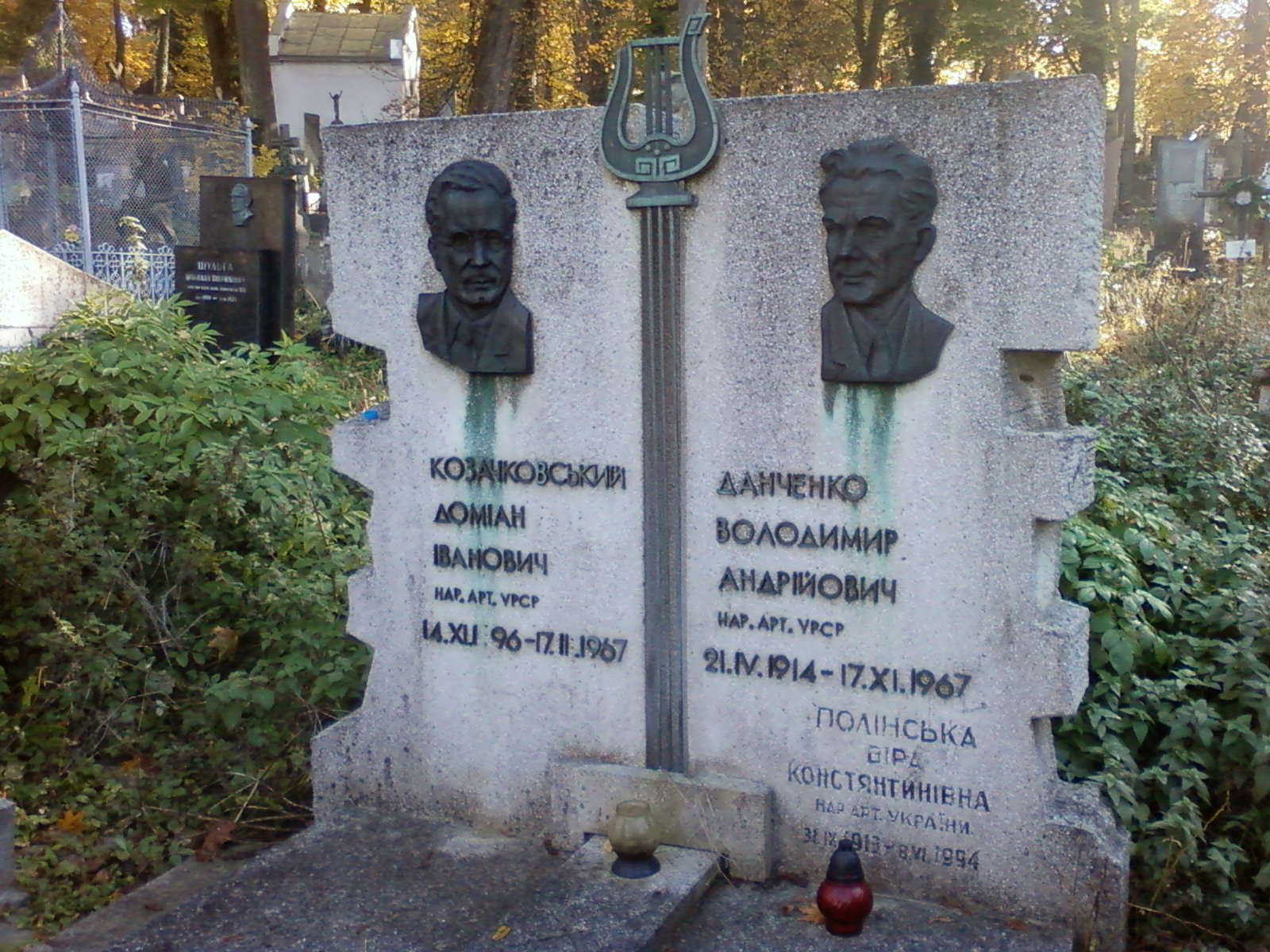 Памятник на могиле Владимира Андреевича Данченко (настоящая фамилия — Данчишин) (1914—1967), украинского советского актëра театра и кино, народного артиста УССР на Лычаковском кладбище (Львов)